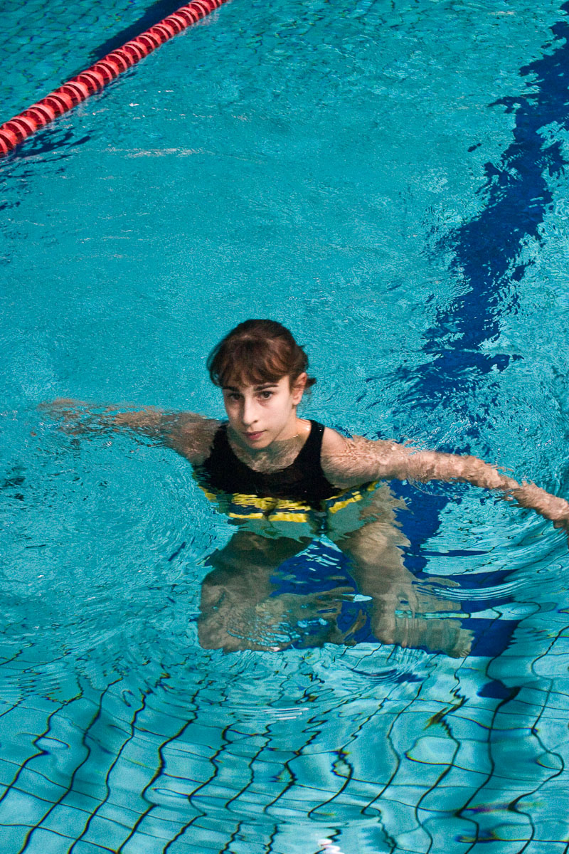 Lenika de Simone en el CAR de Madrid en 2004.